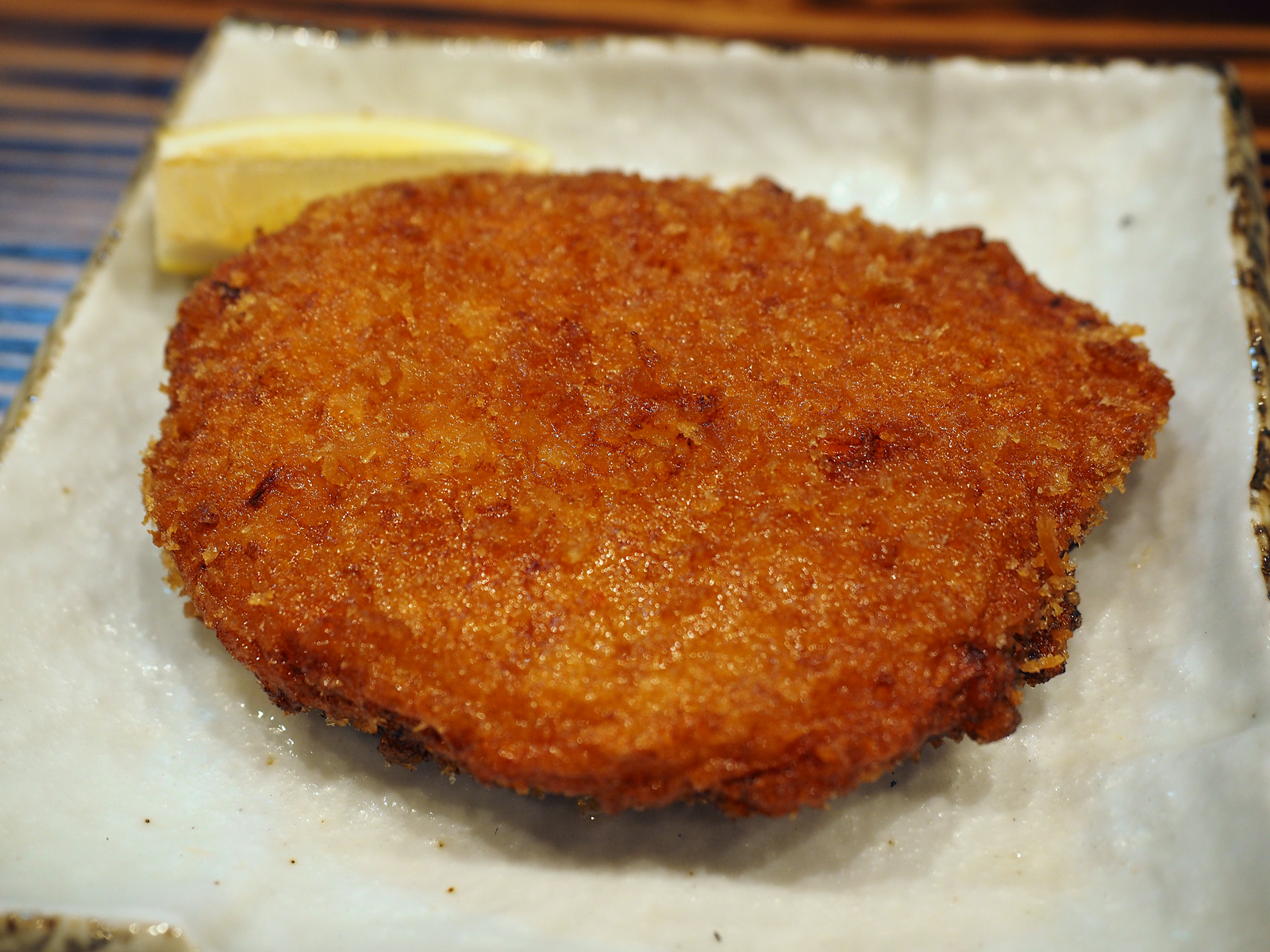 ぎょろっけ（大分県津久見市の郷土料理）